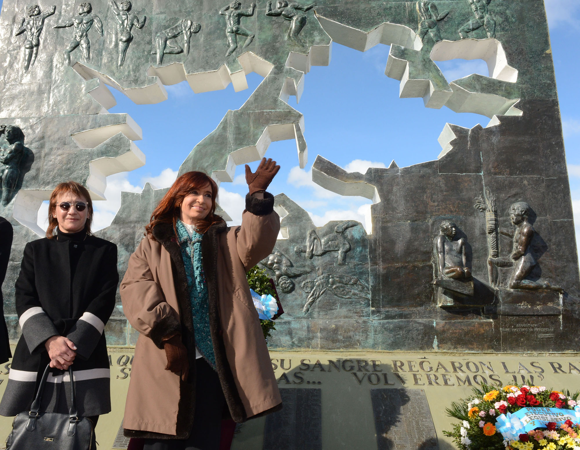 La presidente Argentina, Cristina Fernández de Kichner, en el monumento a los caídos en la Guerra de Malvinas.